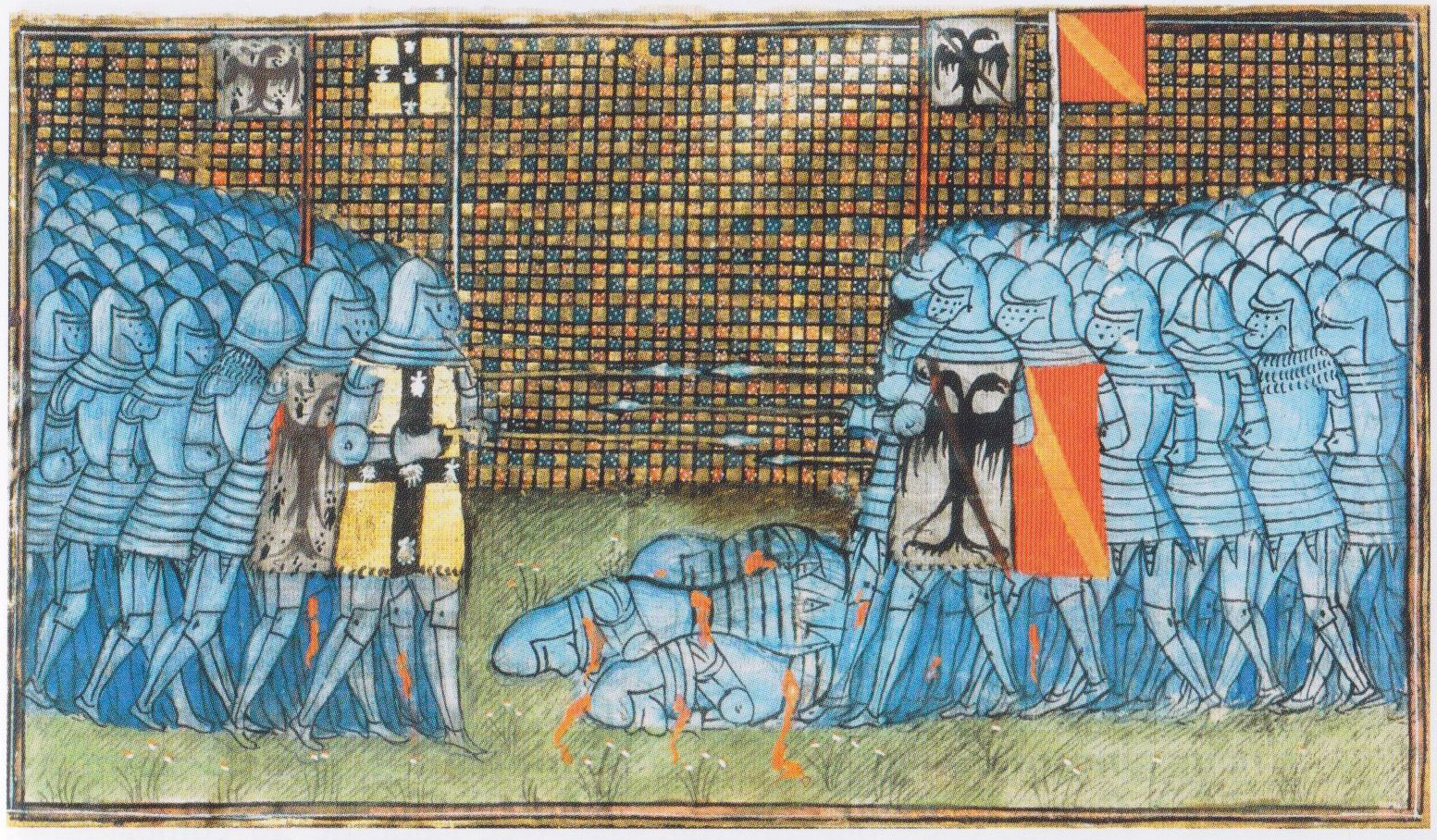 C'est la bataille de coucherel où les anglois et navarrois furent desconfis et le captal de beuch pris et messire jehan joel mort et plusieurs autres par les françois. BNF Français 2662 fol.283 verso [1].